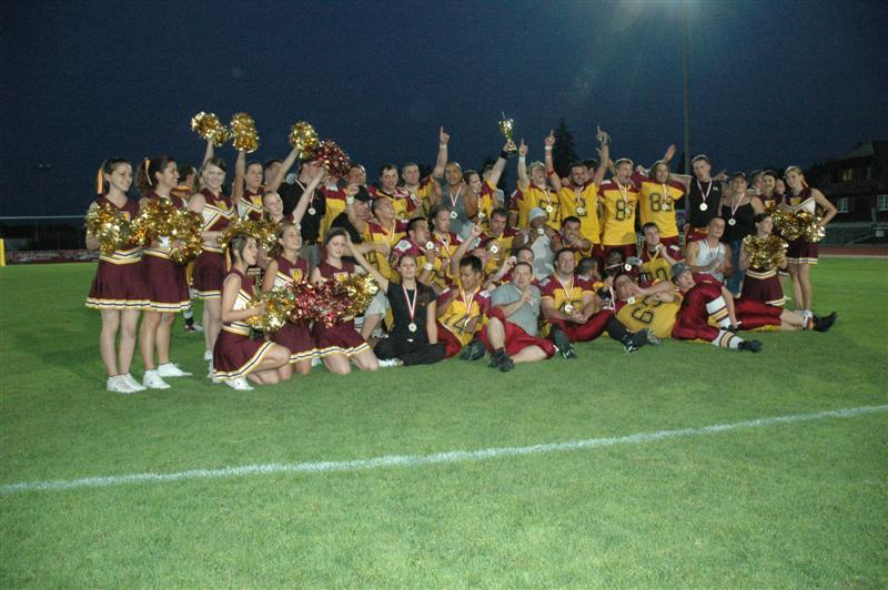 Teamfoto der Winterthur Warriors nach Erringen des CH-Meistertitels 2006